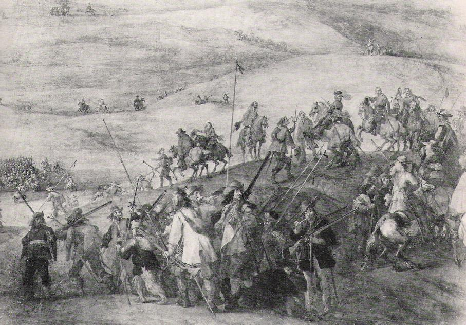 Batalla de BailenSocors del setgede lleida